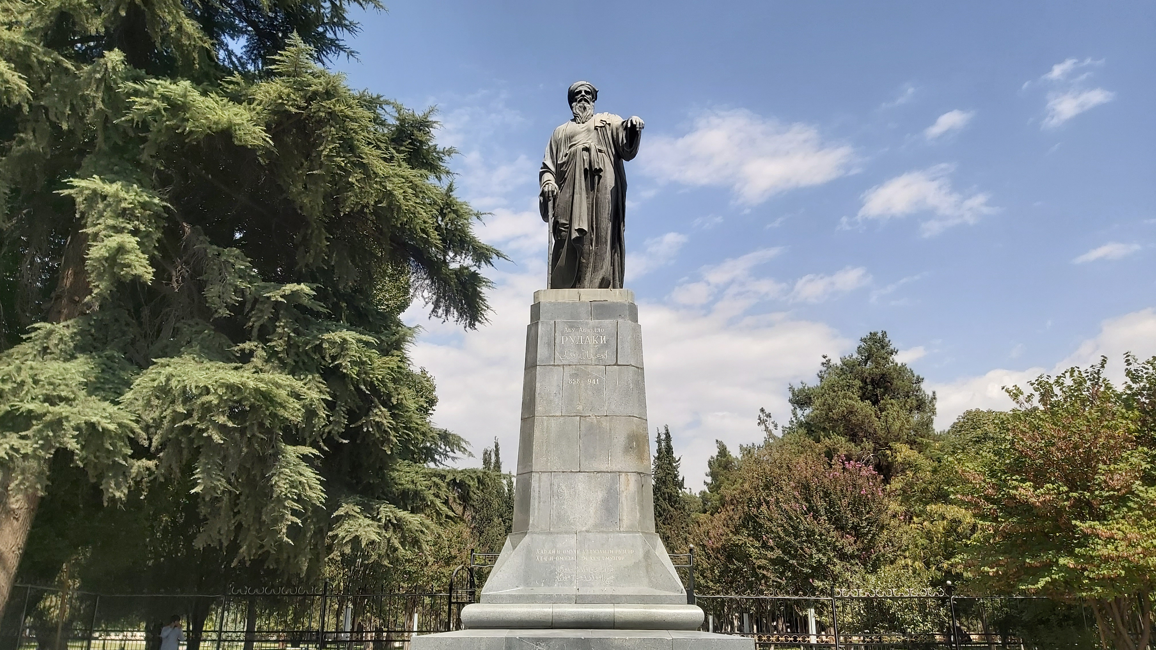 Памятник Рудаки на площади Рудаки